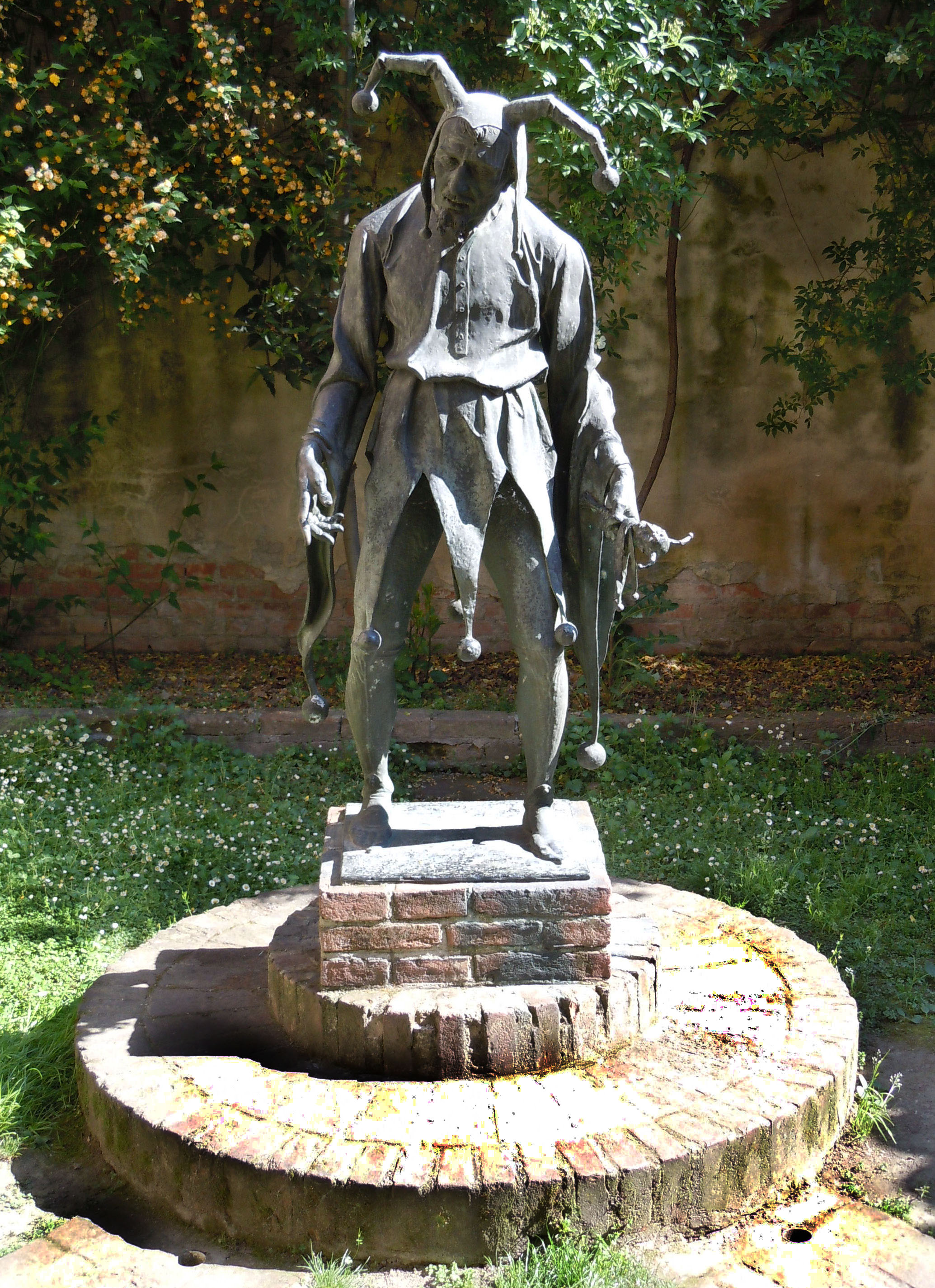 Mantova, scultura a Rigoletto.